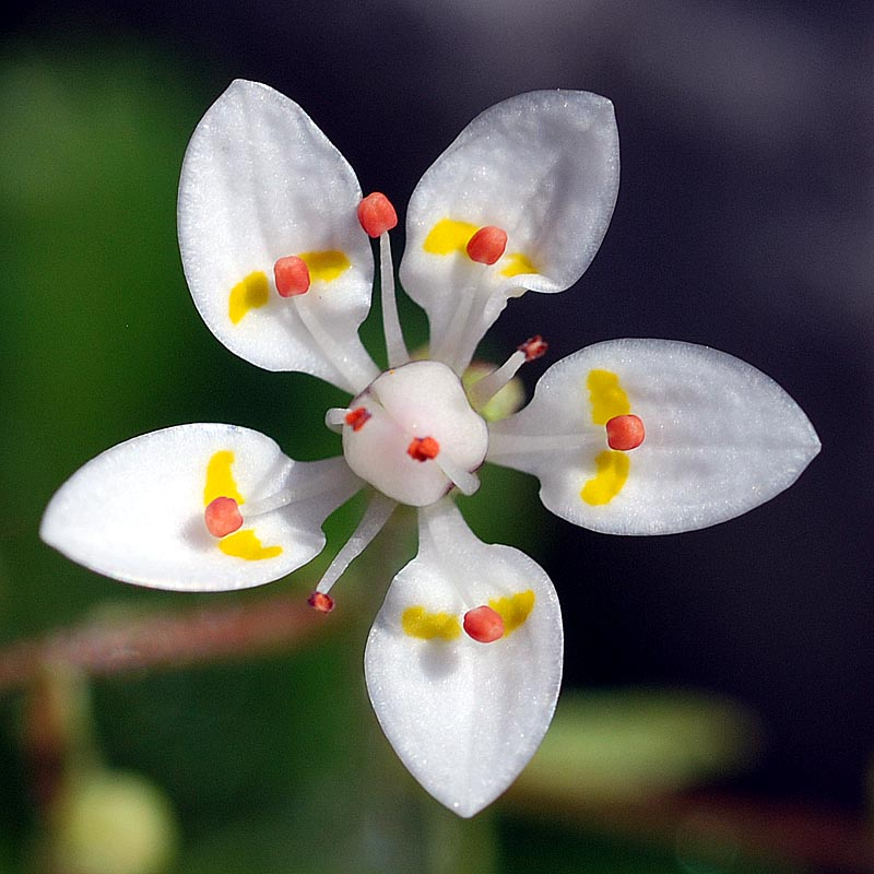 Stern-Steinbrech (Saxifraga stellaris) - Aufgenommen am 20. August 2009 südlich vom Ellmauer Tor im Kaisergebirge (Österreich)